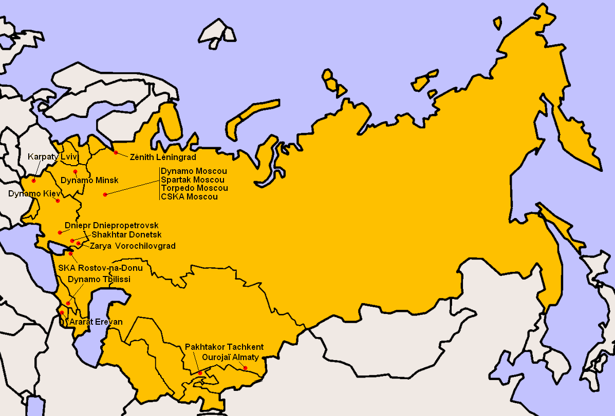 Clubs participants à la Division Supérieure 1973.